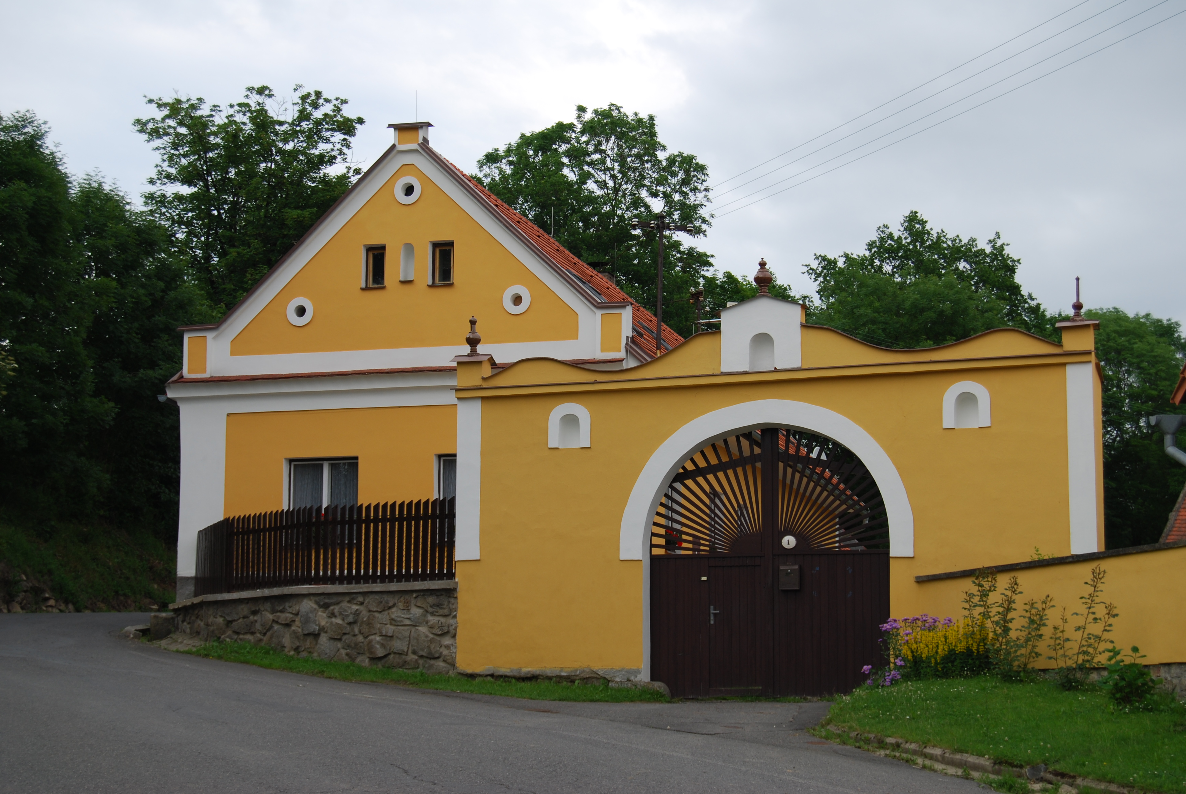 Stavení čp. 1 v obci. Týnice je část obce Přeštěnice v okrese Písek. Česká republika.